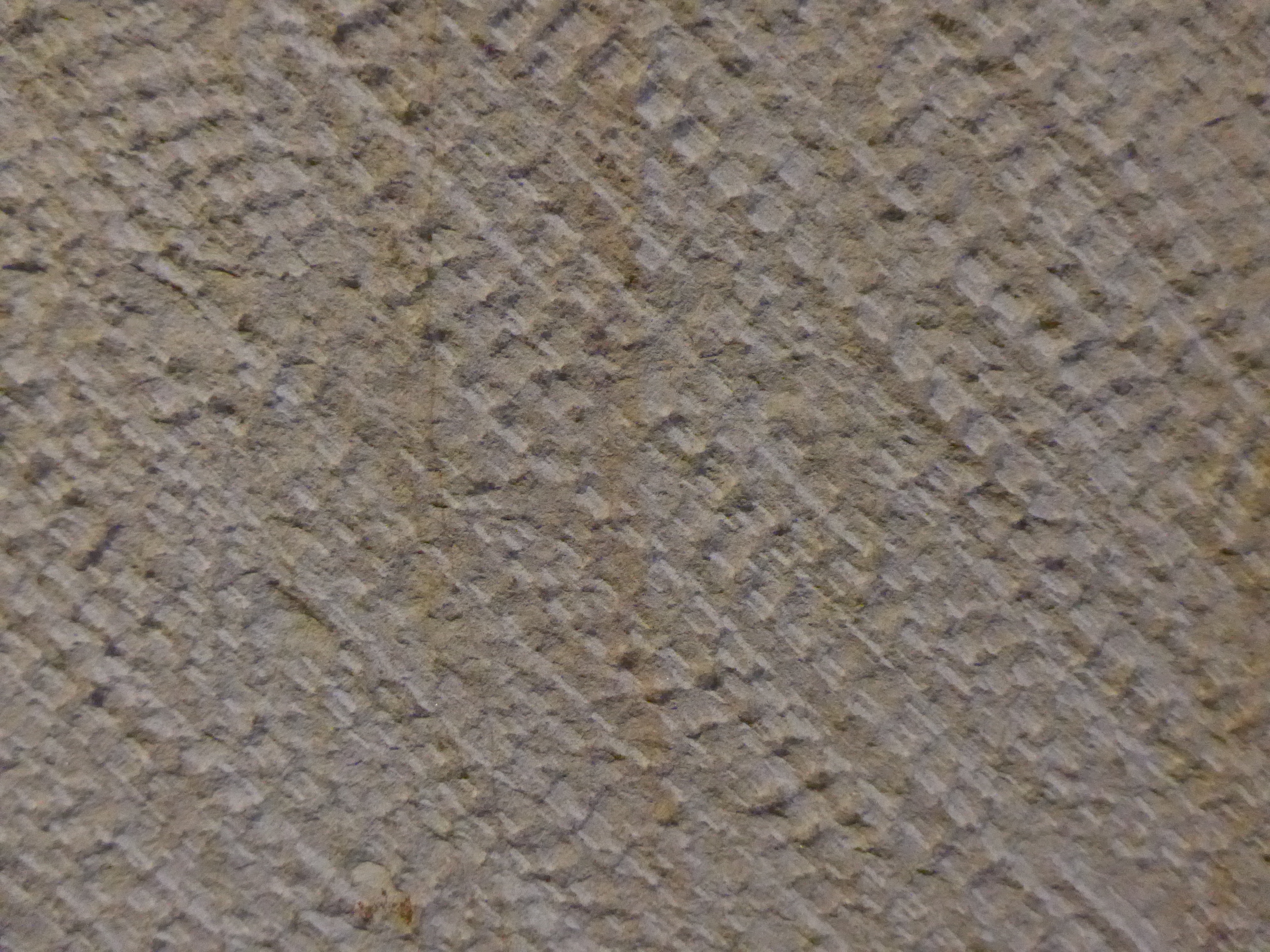 Mit dem Krönel bearbeitete Sandsteinoberfläche. Exponat im Sandsteinmuseum Havixbeck. Demonstrationsmusterstück.